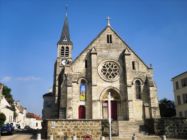 L'église Notre-Dame-de-l'Assomption de Verrières-le-Buisson (Essonne, France)